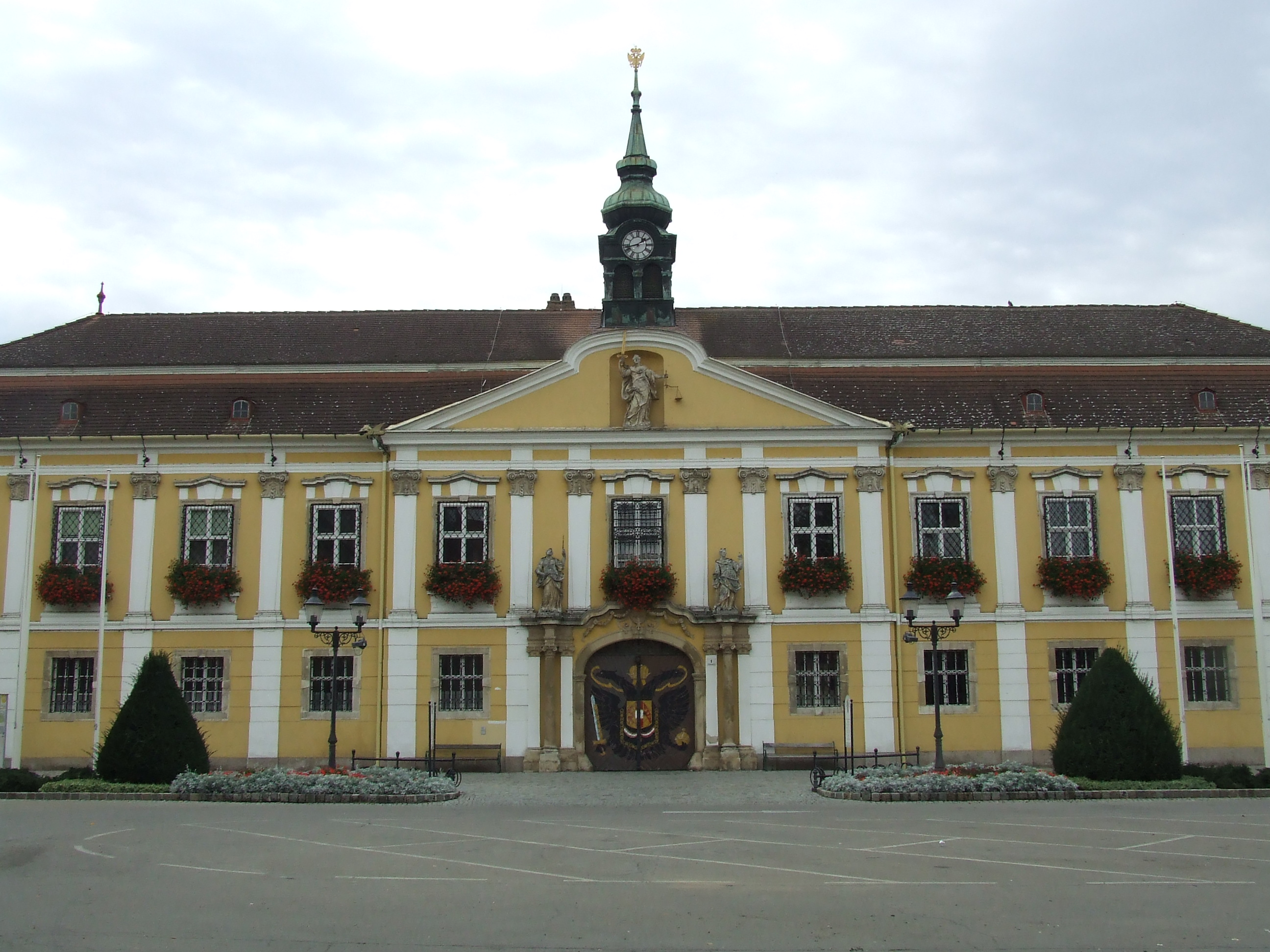 Rathaus/Gemeindeamt